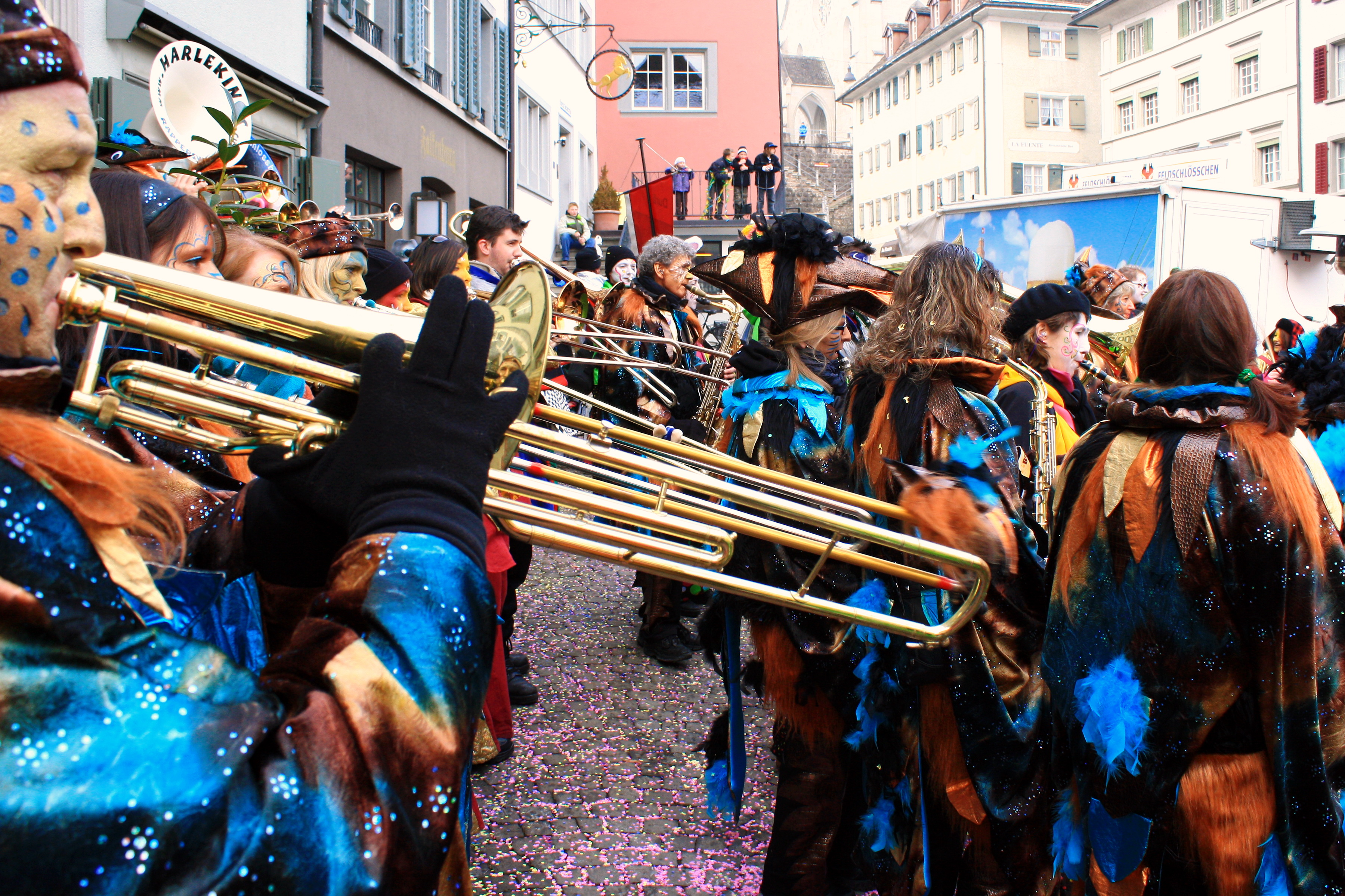 Eis-zwei-Geissebei at Rathaus on Hauptplatz in Rapperswil (Switzerland)